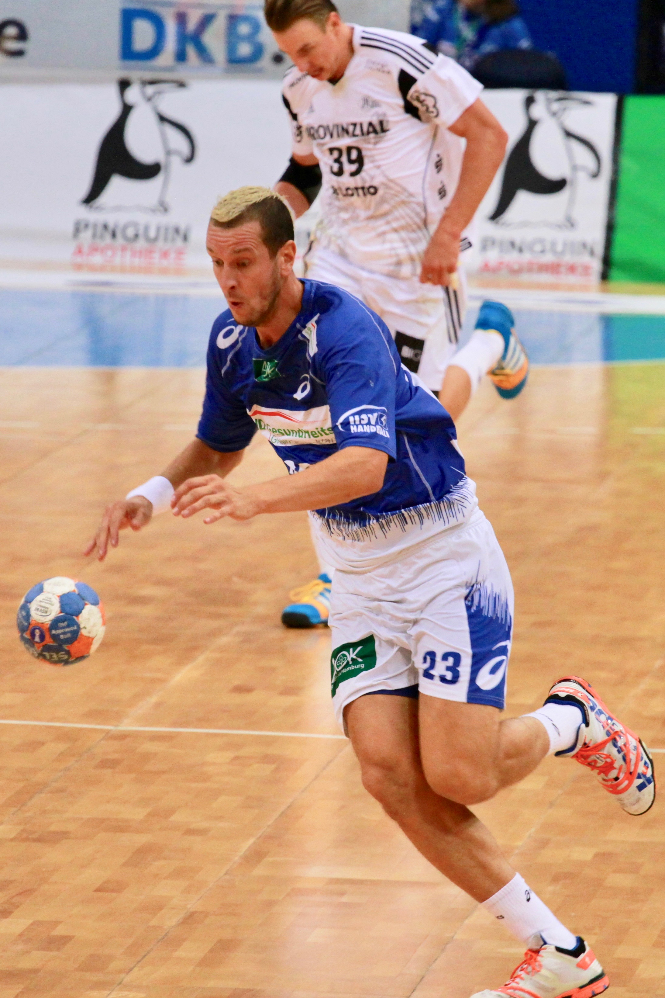 Pacal Hens im Trikot des Hamburger SV.